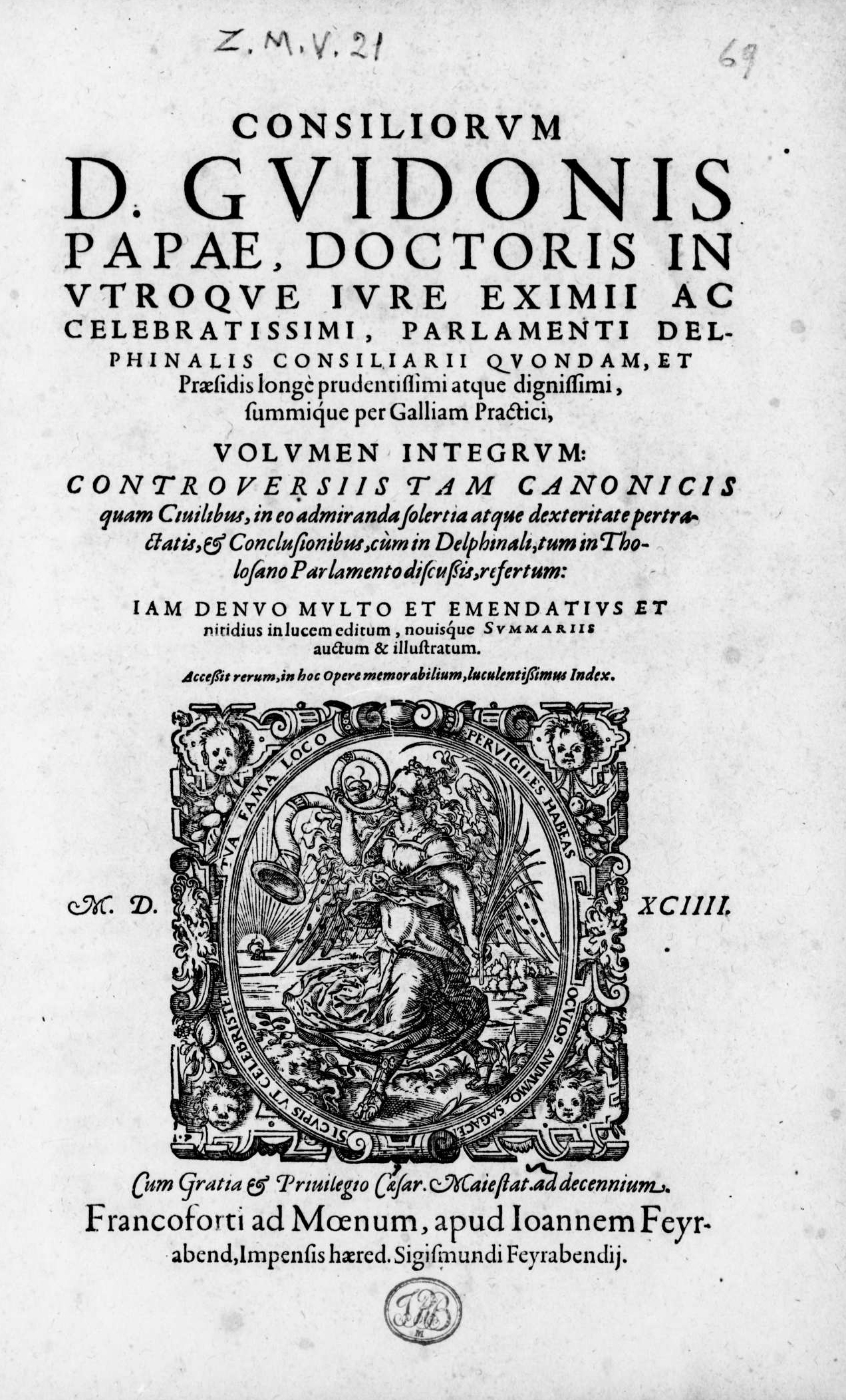 Frontespizio